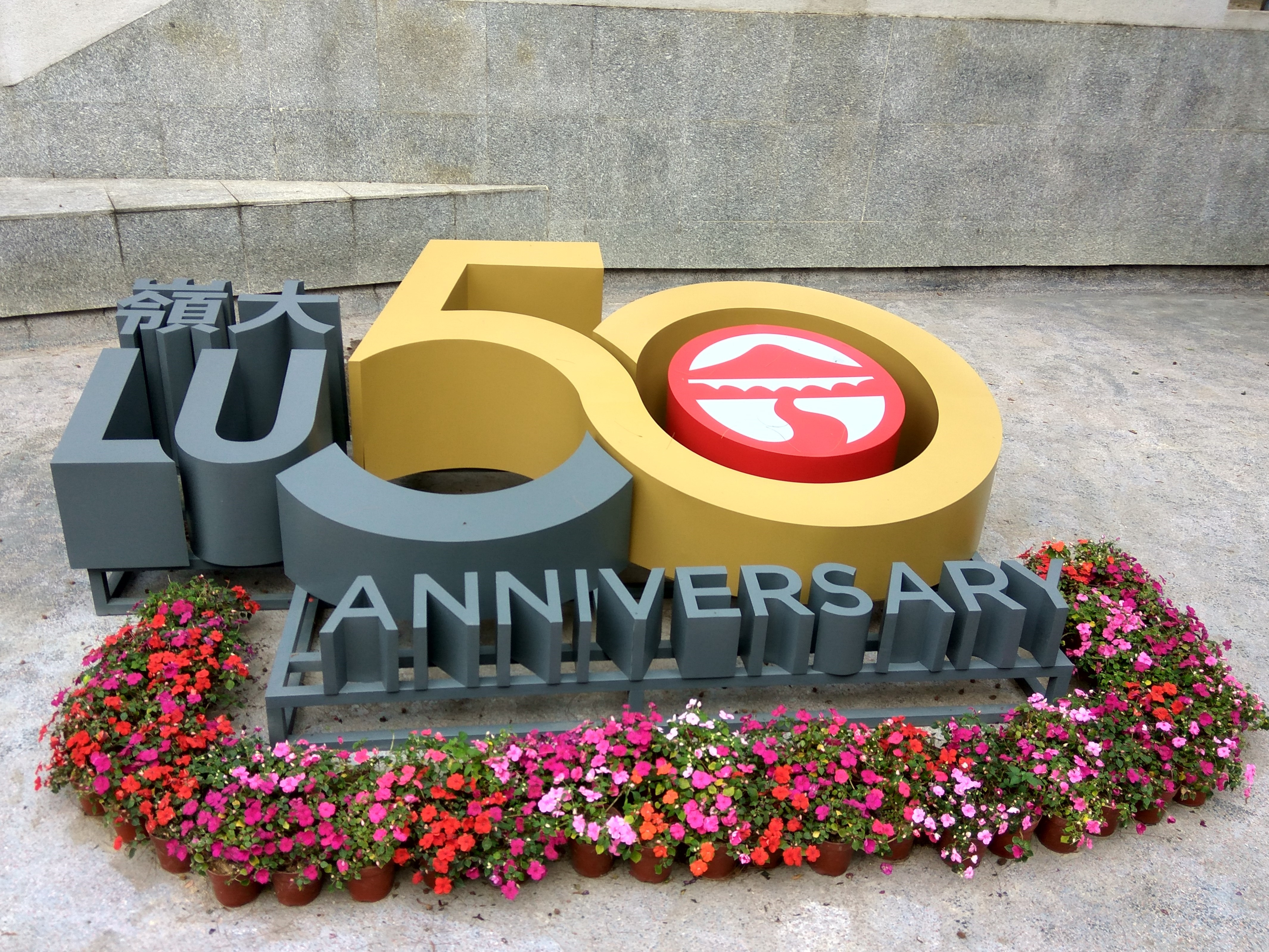 中文（香港）: 嶺南大學50週年花飾。